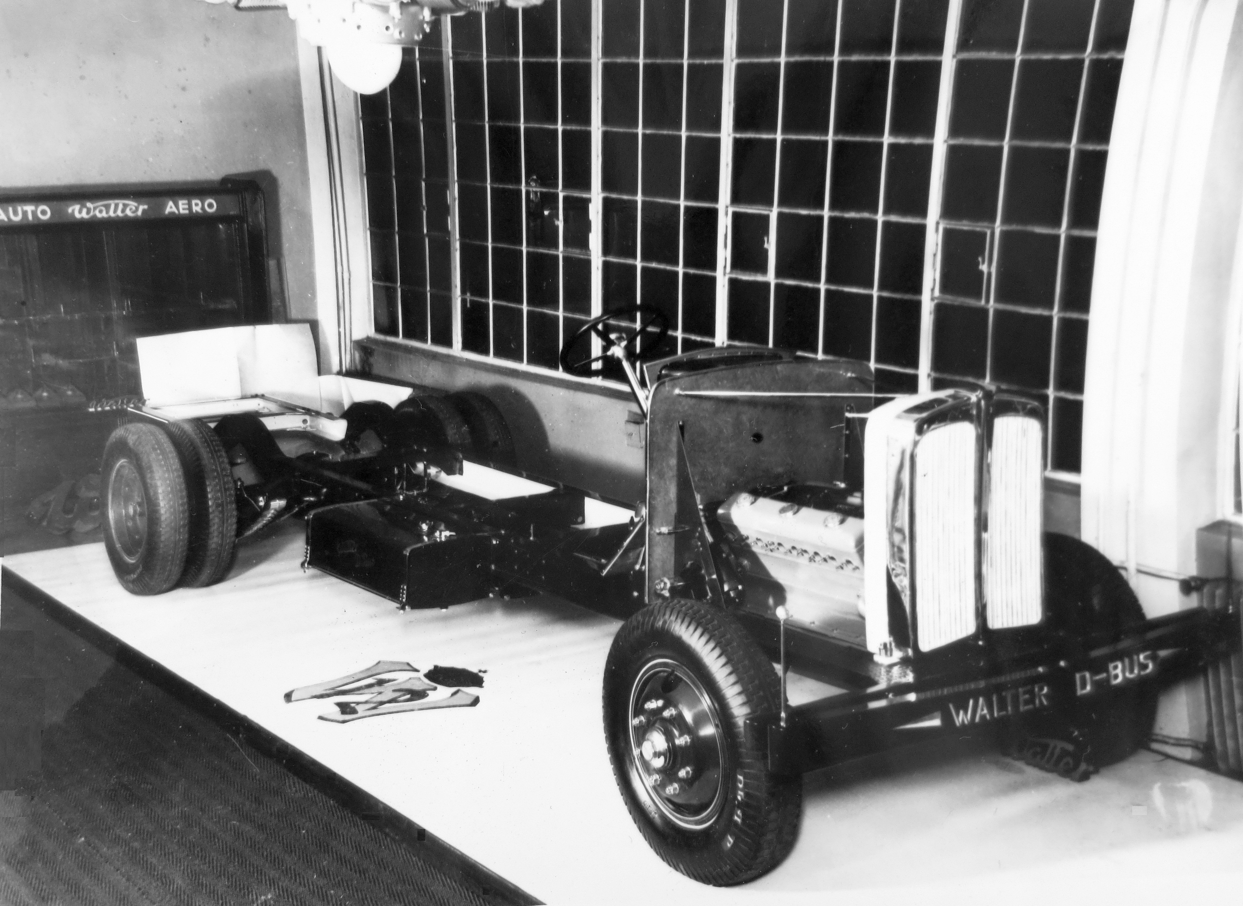 Walter D-Bus, podvozek autobusu (1932)